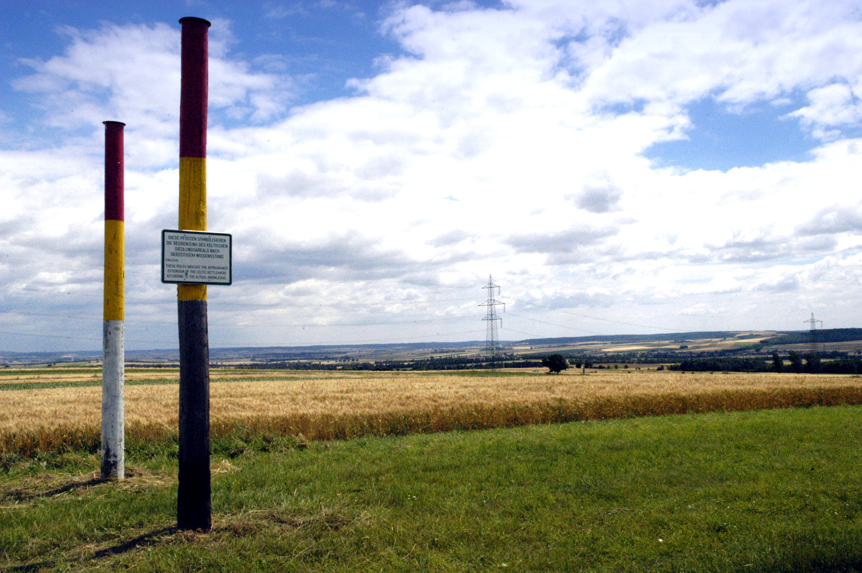 Grenzmarkierung der ehemaligen Keltenstadt auf dem Sandberg bei Roseldorf (Gemeinde Sitzendorf an der Schmida)